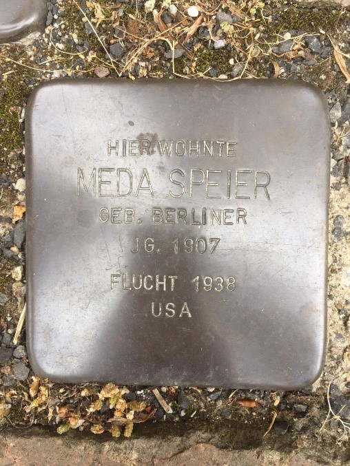 Stolpersteine